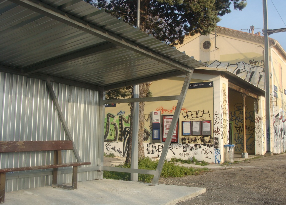 L'abri à voyageurs de la gare de Séon Saint-Henry, sur quai impair (direction Saint-Charles). Au second plan, l'ancien bâtiment voyageurs, aujourd'hui fermé.